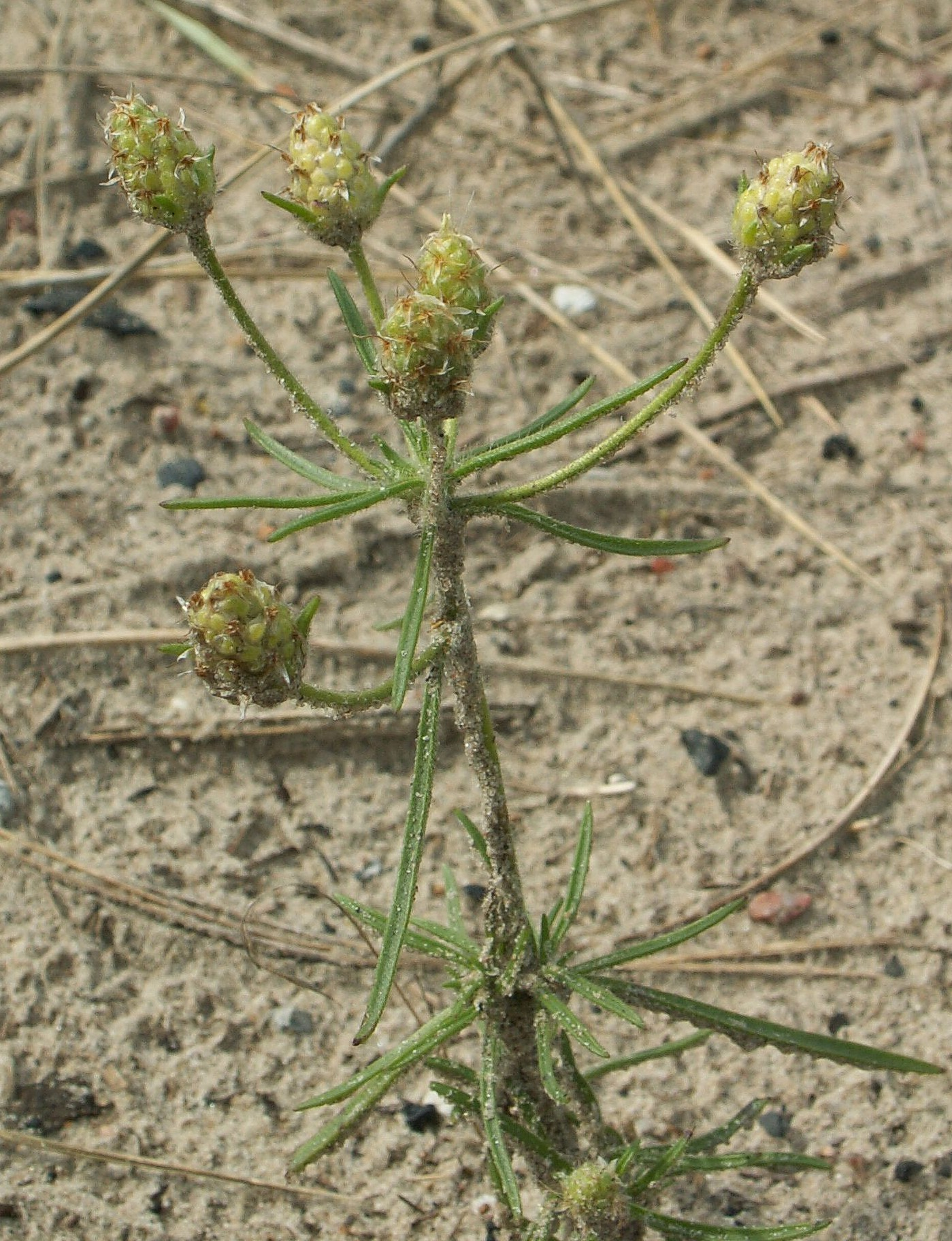 Plantago arenaria in Swinoujscie, NW Poland